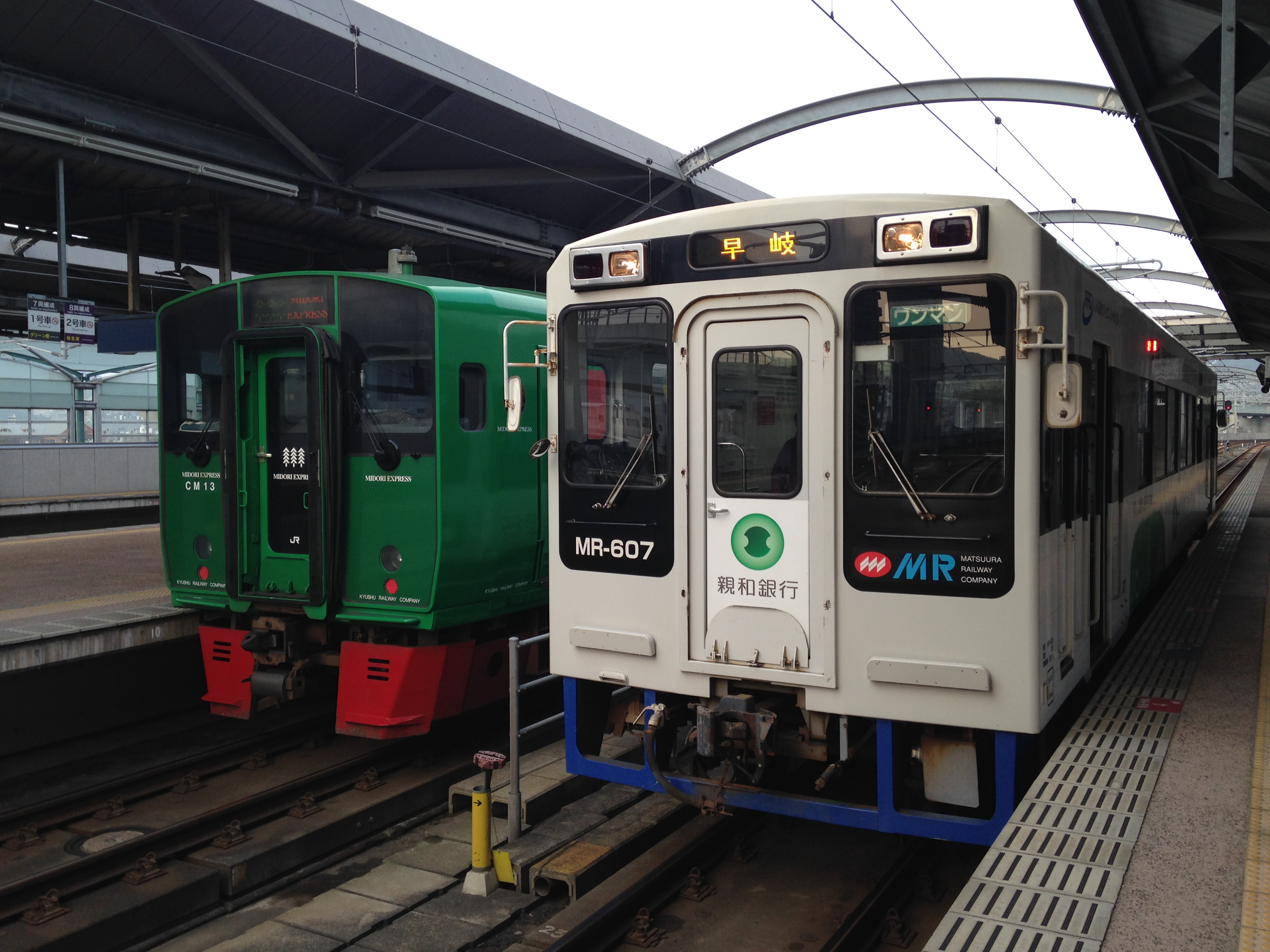 JR佐世保駅のホームに停車する早岐行き松浦鉄道列車、隣は停車中の特急みどり